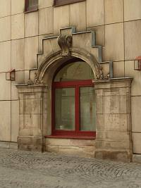 Fürth, City Center, Portalrest der Brauerei Geismann, von NO (2004-01-17); klein (200px). Fotograph: keichwa.